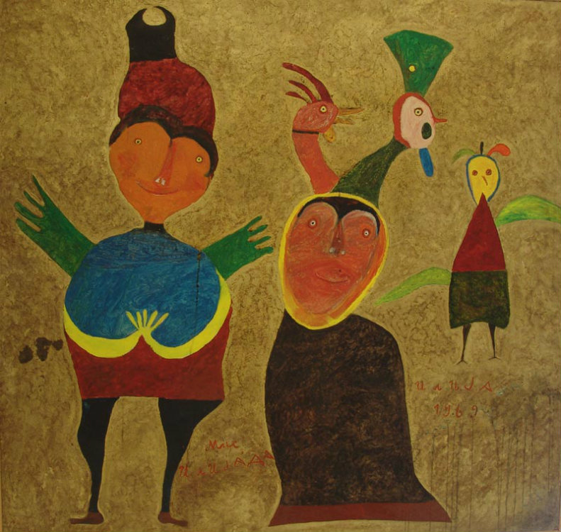 Bašicevic Bosilj Ilija, Mis Ilijade,1969.ulje-lesonit,115x120 cm